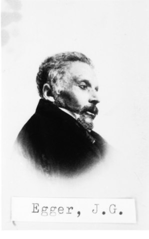 Иоганн Непомук Георг Эггер (нем. Johann Nepomuk Georg Egger; 15 мая 1804, Зальцбург, Австрийская империя — 19 марта 1866, Вена, Австро-Венгрия) — австрийский врач и энтомолог. Доктор медицины.